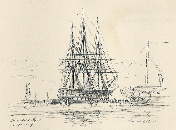 Linjeskibet "Skjold" 1849.